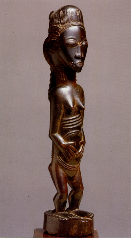 STATUA antropomorfa femminile in posizione eretta. Volto dalla superficie levigata e lucida, occhi chiusi, naso diritto con narici evidenti, bocca ellissoidale con denti in vista e scarificazioni ai lati, mento appuntito. Elaborata acconciatura con treccia che scende lungo la schiena. Collo, busto e ventre scarificati. Braccia che corrono aderenti al corpo per poi convergere verso il ventre, con mani che si toccano. Gambe breviformi e flesse che poggiano su piedistallo cilindrico. Le stauette baulé rappresentano spiriti della boscaglia (asie usu) o "sposi dell'aldilà" (blolo bian e blolo bla). Gli spiriti asie usu possono prendere possesso delle persone entrando nel loro corpo e mandandole in trance. Gli effetti possono essere molto violenti, causare malattie e anche la morte. Alcune di queste persone diventano indovini mettendosi così al servizio della comunità. Gli asie usu sono descritti come orribili ma le loro rafigurazioni sono intenzionalmente belle, nel tentativo di placarli. Le figure degli "sposi dell'al di là" sono secondo Susan Vogel (1997) indistinguibili, per forma e iconografia, da quelle degli spiriti della boscaglia. I Baulé credono che venendo al mondo si abbandoni lo sposo o la sposa che si aveva nell'aldilà causandone il risentimento. Per evitarne l'ira (che si manifesta con malattie, sterilità, impotenza) si fanno scolpre delle figure che corrispondono al modo in cui lo sposo dell'aldilà vuol essere ritratto.